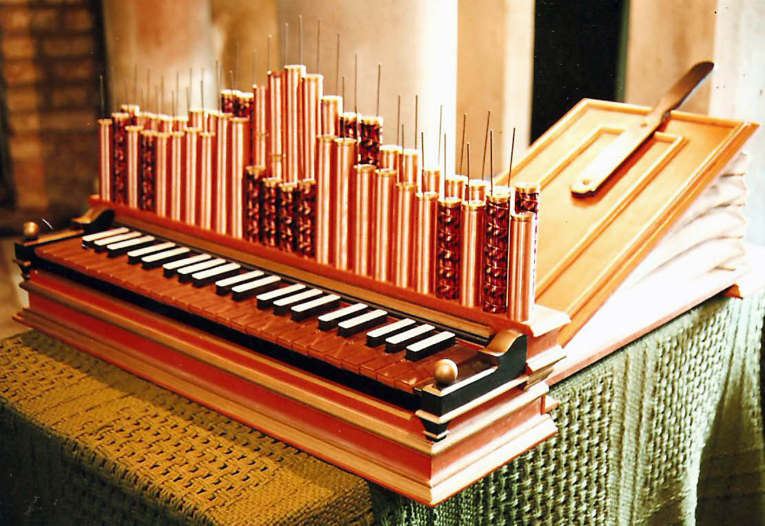 Regał książkowy - kopia techniczna regału gdańskiego z muzeum Himmnitz wykonana przez Romualda Greissa.